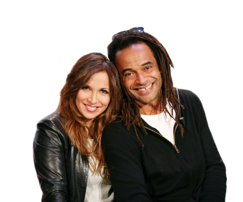 Hélène Ségara et Yannick Noah posent pour la campagne « Enfants, Ados : l'internet sans danger ».